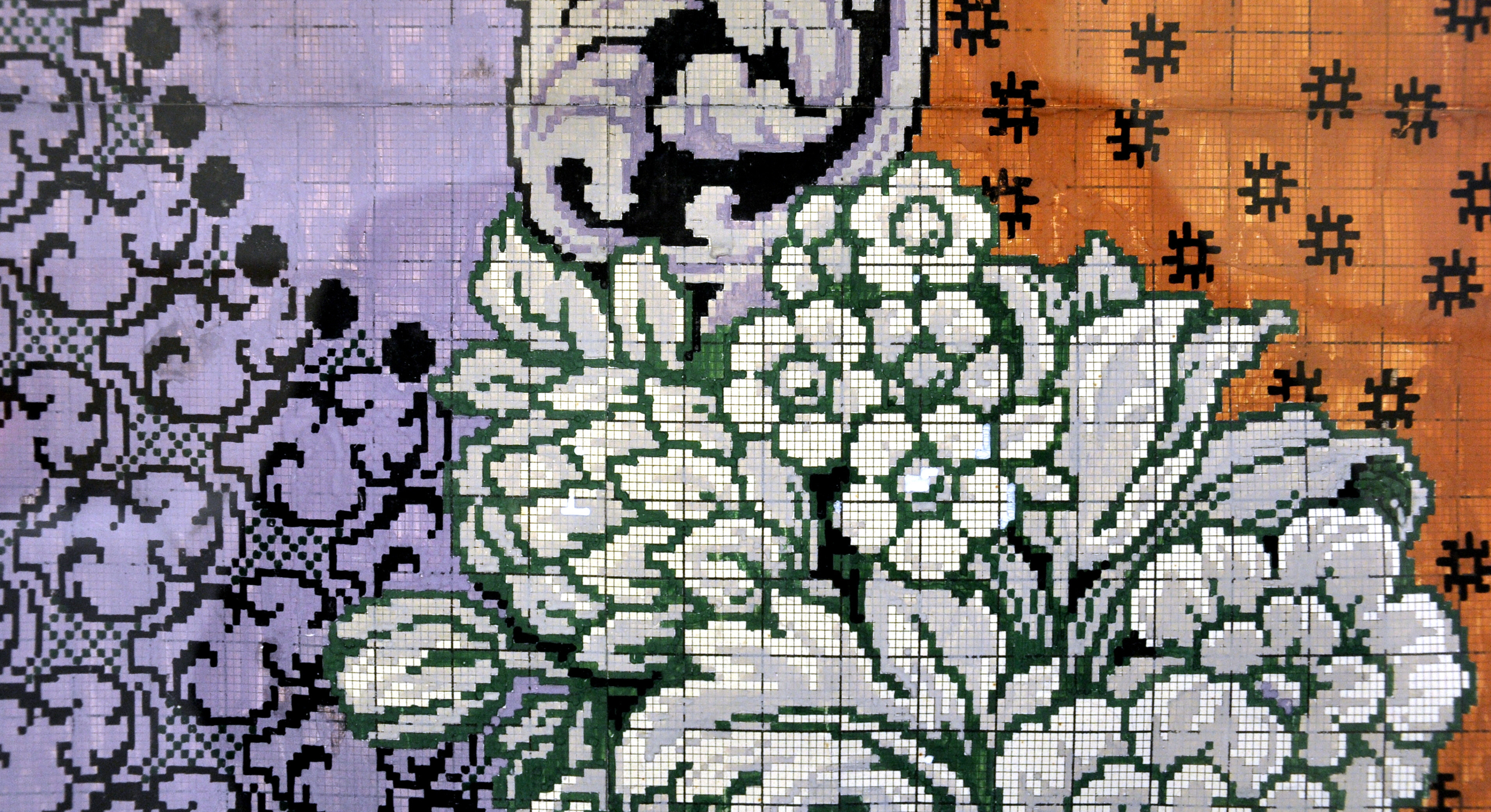 Oelsnitz/Vogtland, Teppich-Museum Schloss Voigtsberg "Patrone" für einen Doppelteppich, um 1910, Dessin: 303, Sächsische Kunstweberei Claviez AG